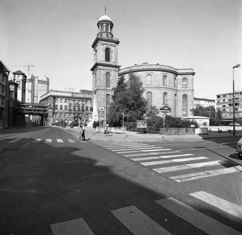 Frankfurt am Main: Paulskirche